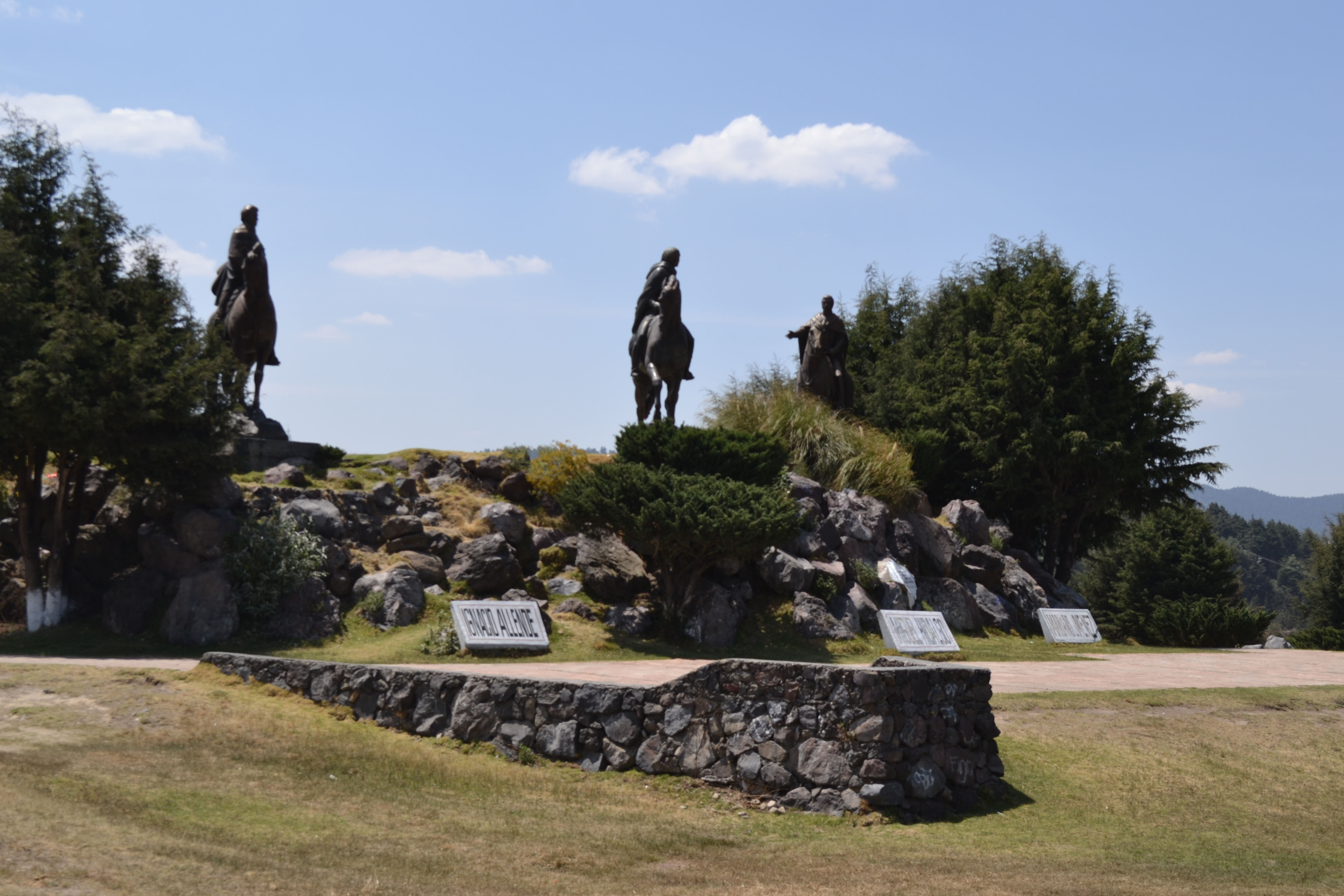 Estatuillas en el Monte de las cruces